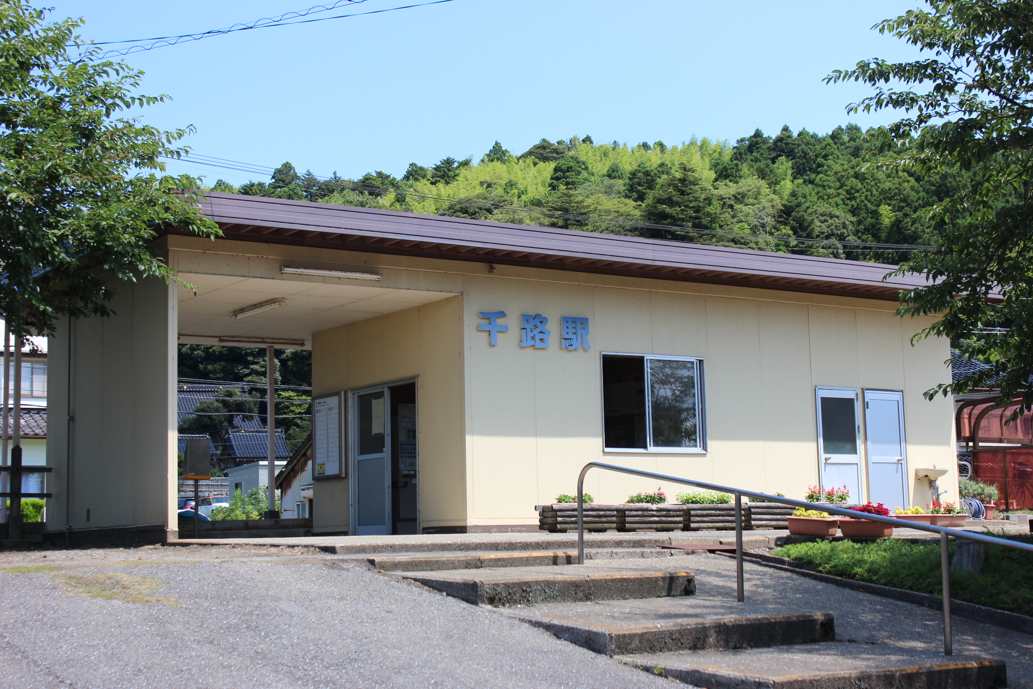 石川県羽咋市にある千路駅の駅舎。 Canon EOS Kiss X5